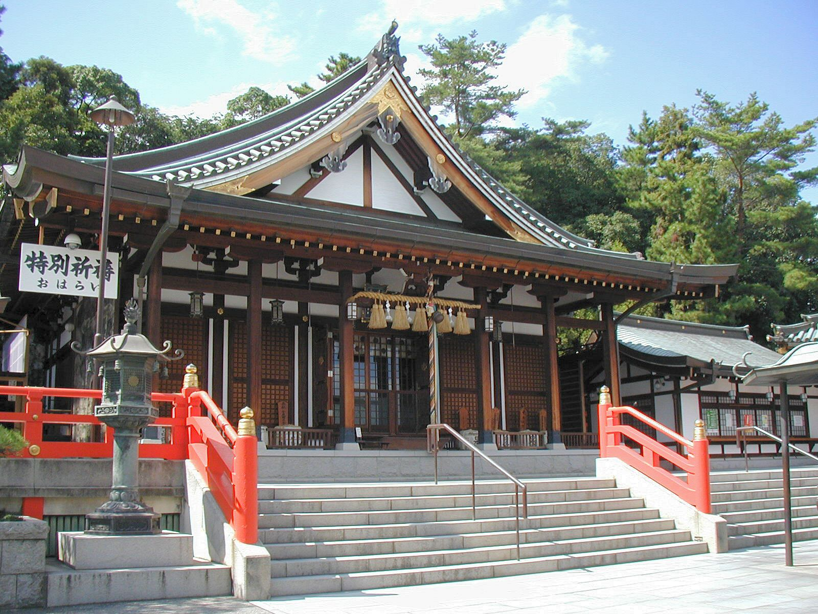 the Yakushi-do of Mondoyakujin, a Japanese templeja:門戸厄神東光寺厄神堂